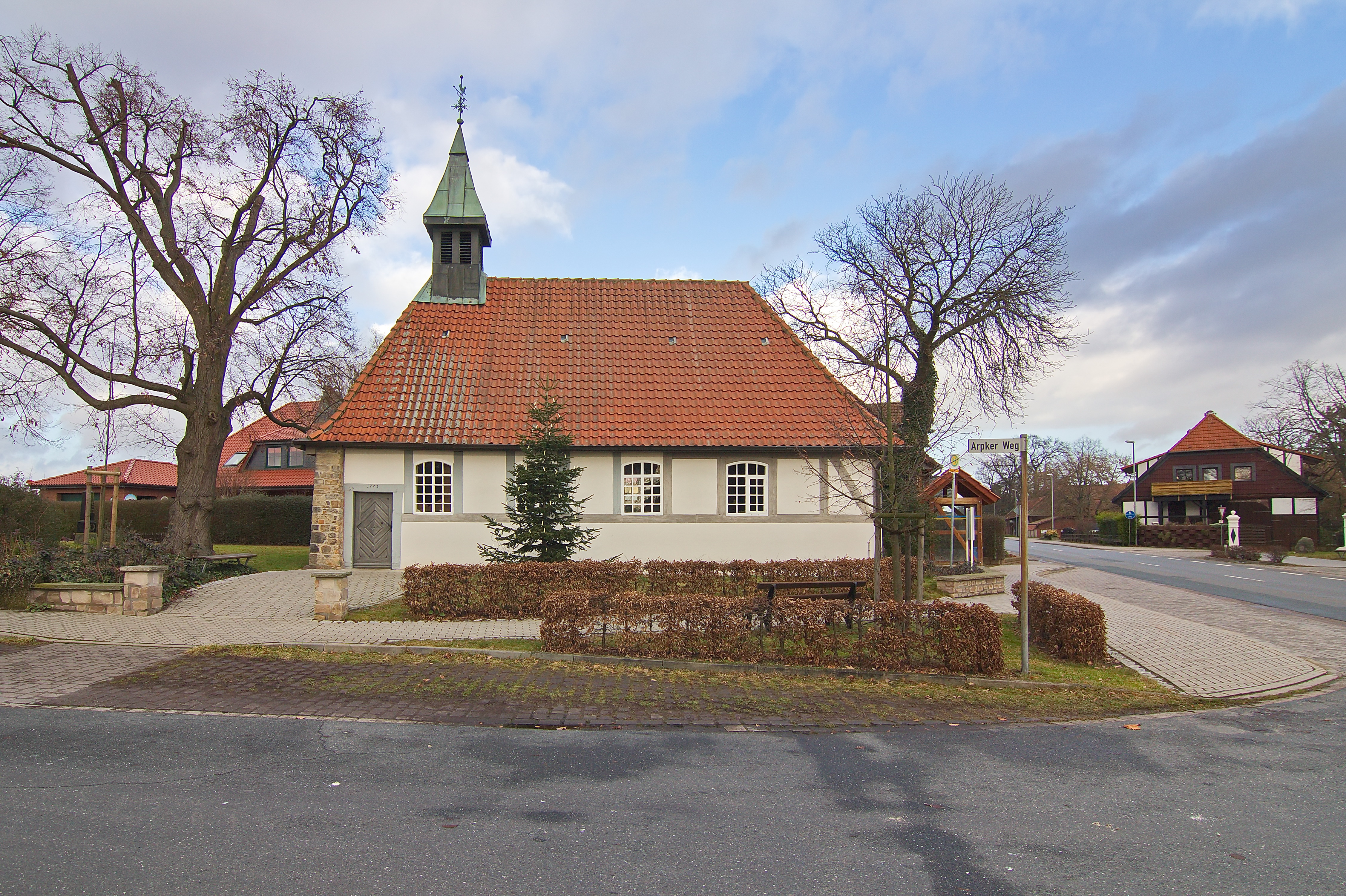 Die Kapelle in Oelerse wurde im 18. Jahrhundert als Fachwerkbau errichtet.